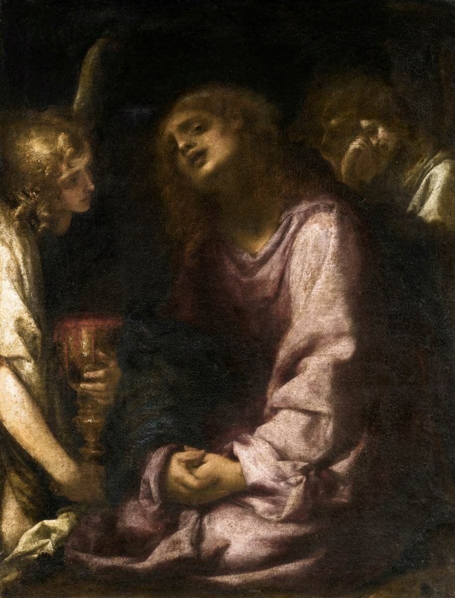 Cecco Bravo - Christ Supported by Two Angels 1650s Oil on canvas, 132 x 105 cm CollezionePrivata